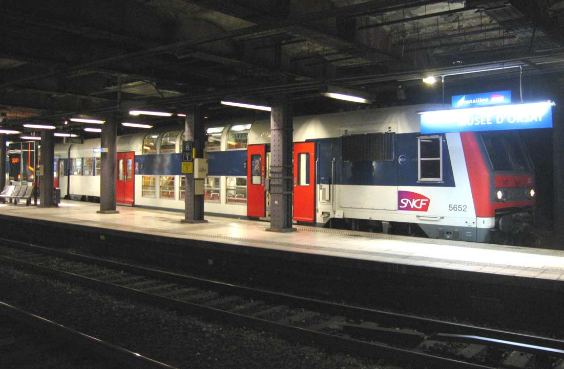 RER Paris ligne C rame serie Z5600 station Musee d Orsay